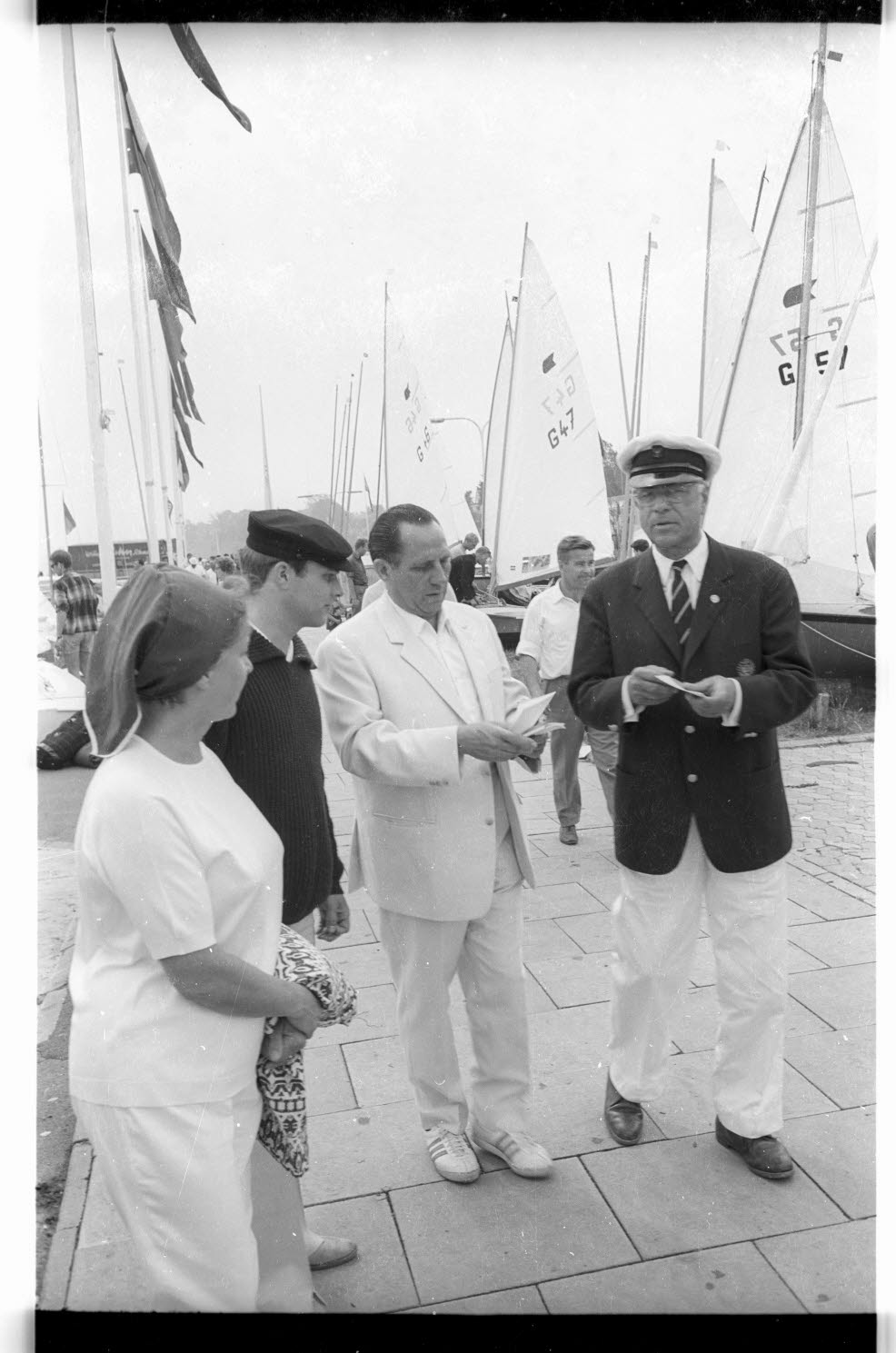 Bundesforschungsminister Gerhard Stoltenberg (Bildmitte) übergibt den neuen Olympia-Segelhafen in Schilksee an die Stadt Kiel, die sich damit für die Olympischen Segelwettbewerbe 1972 bewerben will. Im Bild der Vizepräsident des Nationalen Olympischen Komitees Max Danz und der Präsident Dietrich Fischer (rechts).